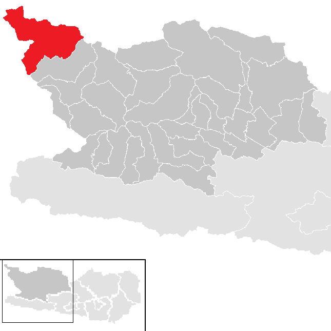 Bezirk Spittal an der Drau